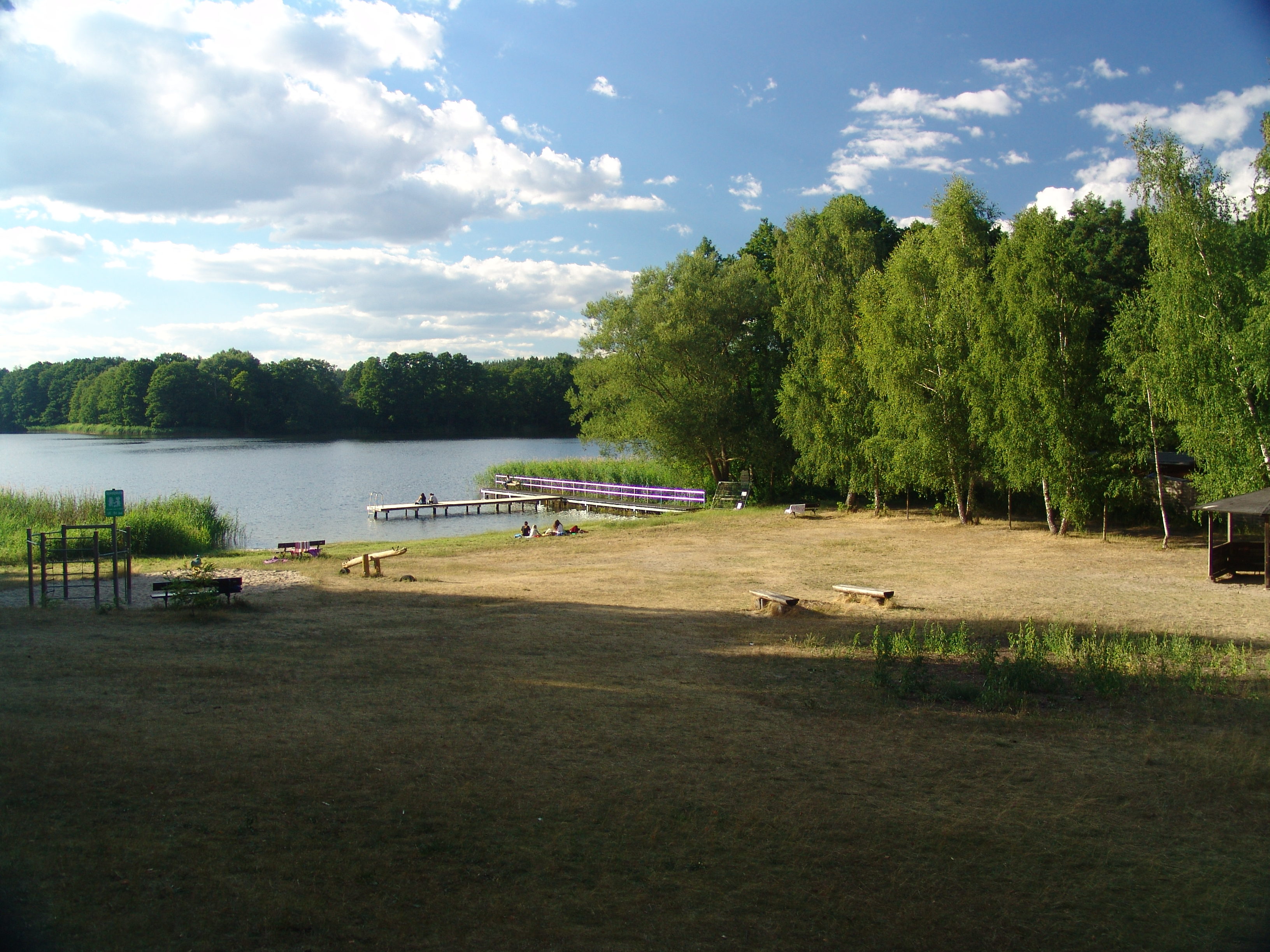 Böhmerheide, Schorfheide: Die öffentliche Badestelle von der Landseite